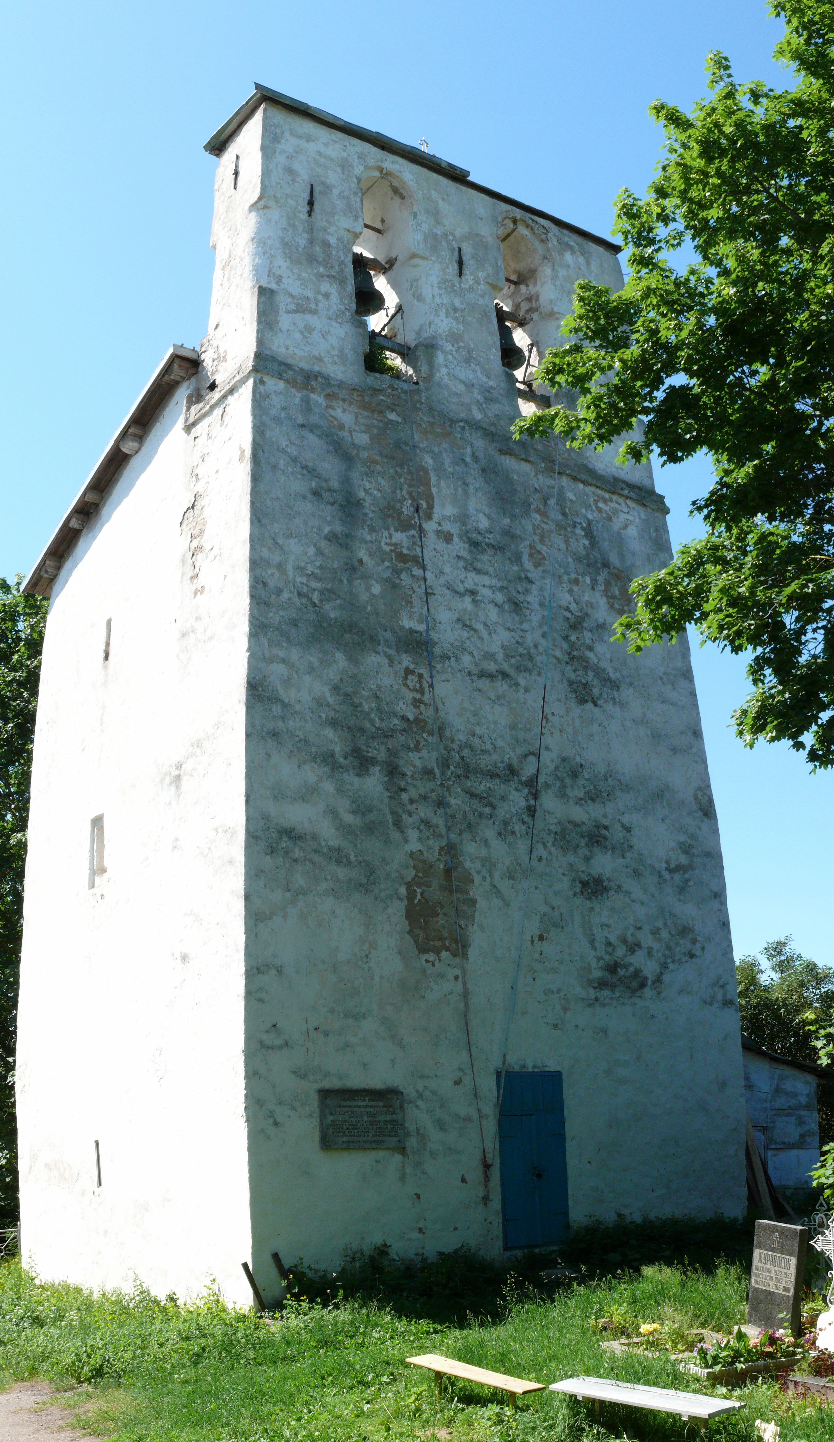 Звонница на погосте Сенно